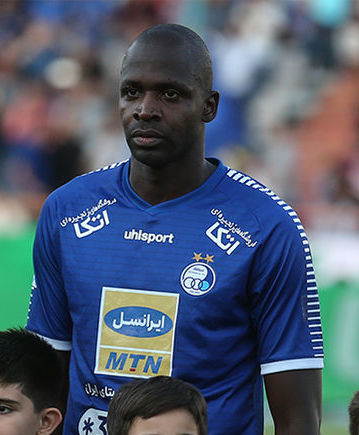 نگاره‌ای از گزارش تصویری دیدار تیم‌های استقلال و فولاد